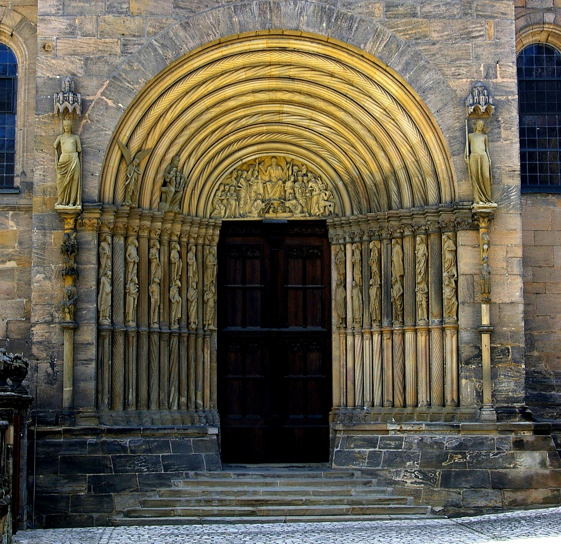 Bamberg-Dom Fürstenportal